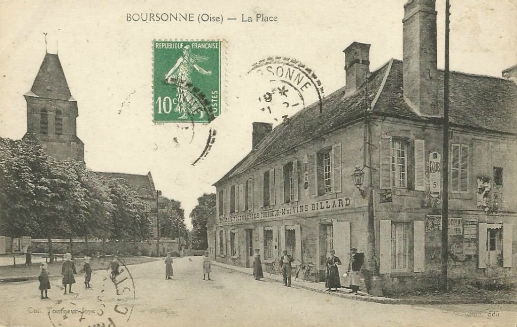 Carte postale du village vers 1903.